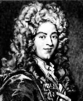 Guillaume Francois Antoine l'Hospital